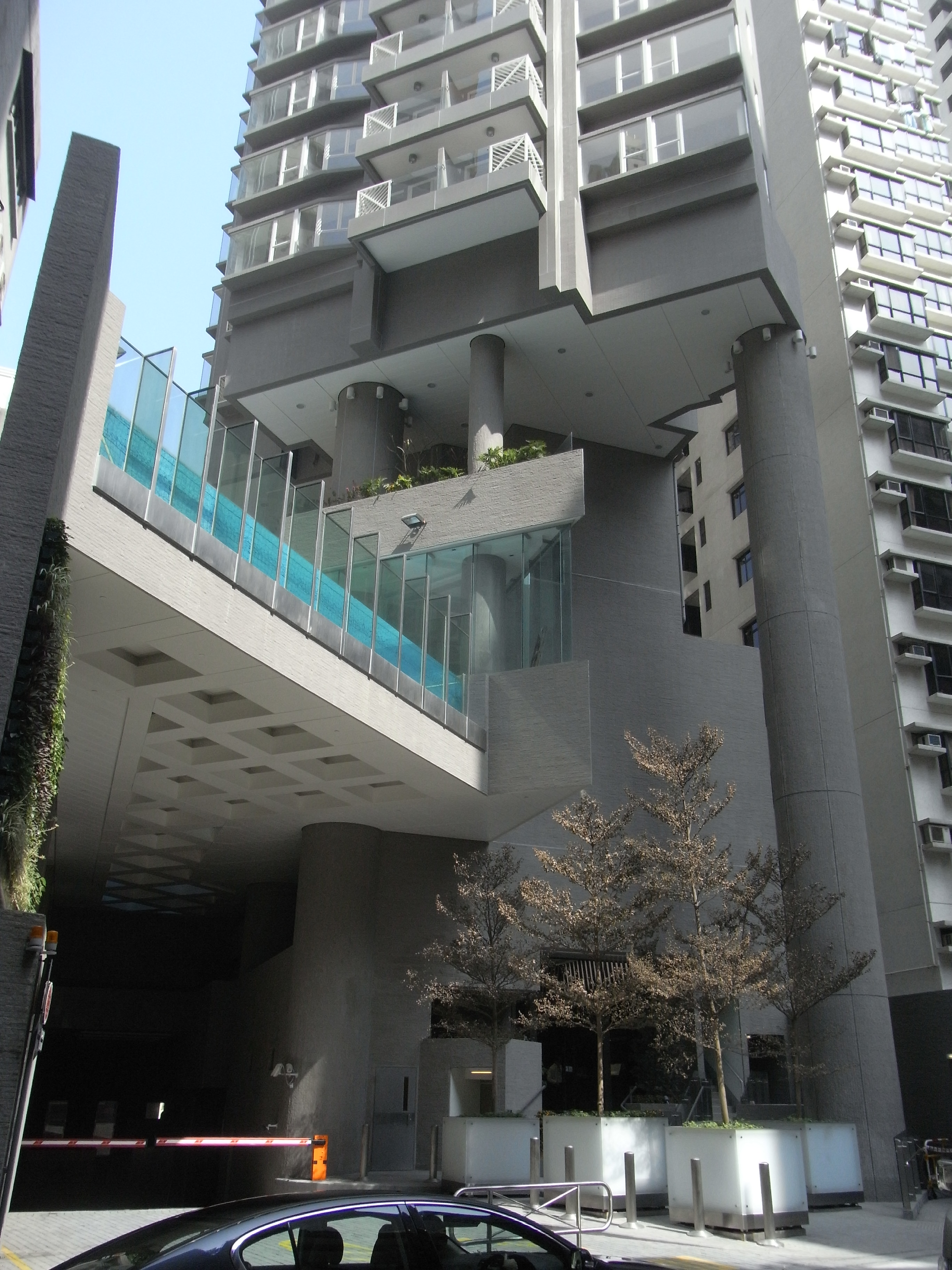 中文（香港）: 香港島干德道